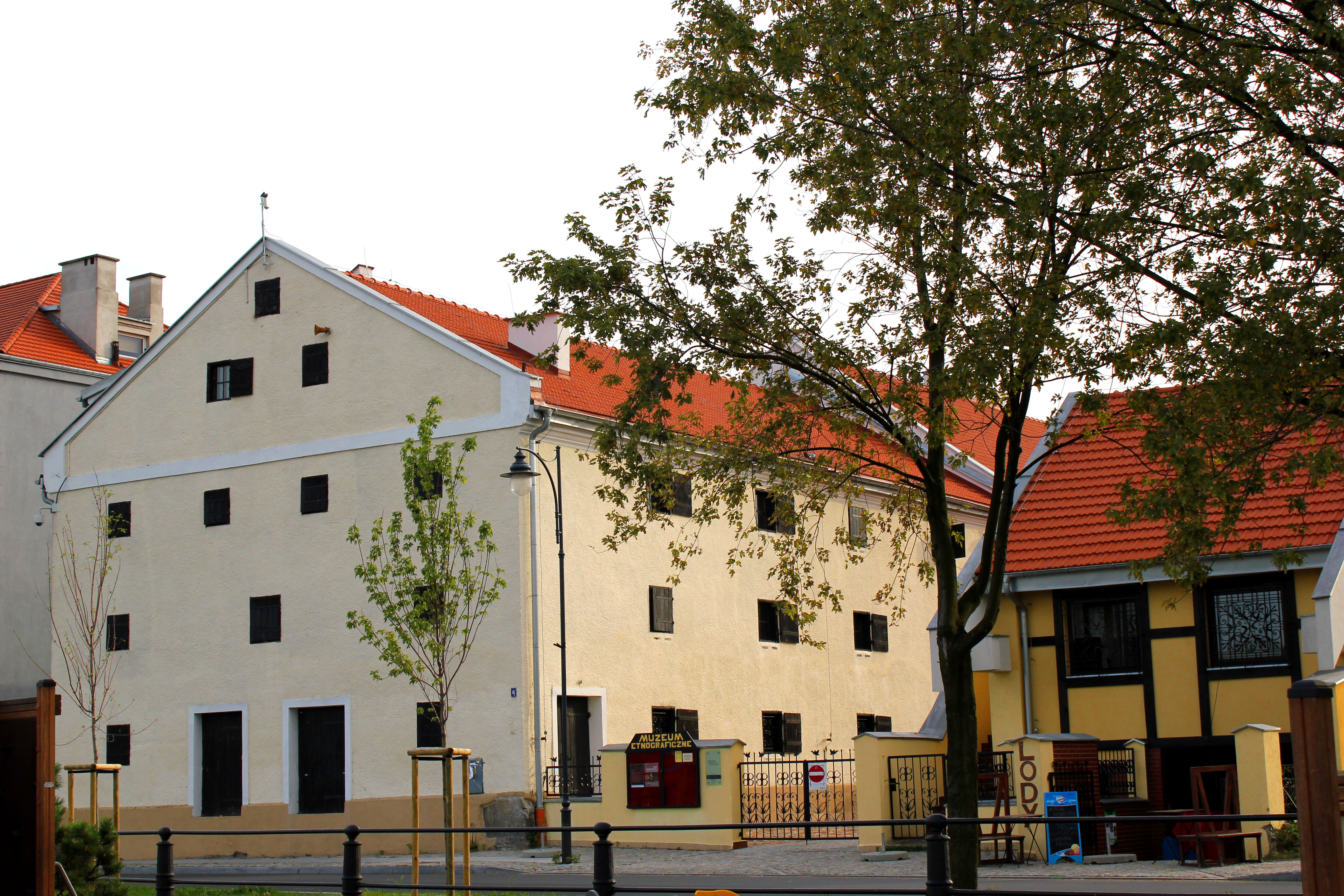 spichrz, 1848 Włocławek, ul. Bulwary Marszałka Józefa Piłsudskiego 6, miasto Włocławek